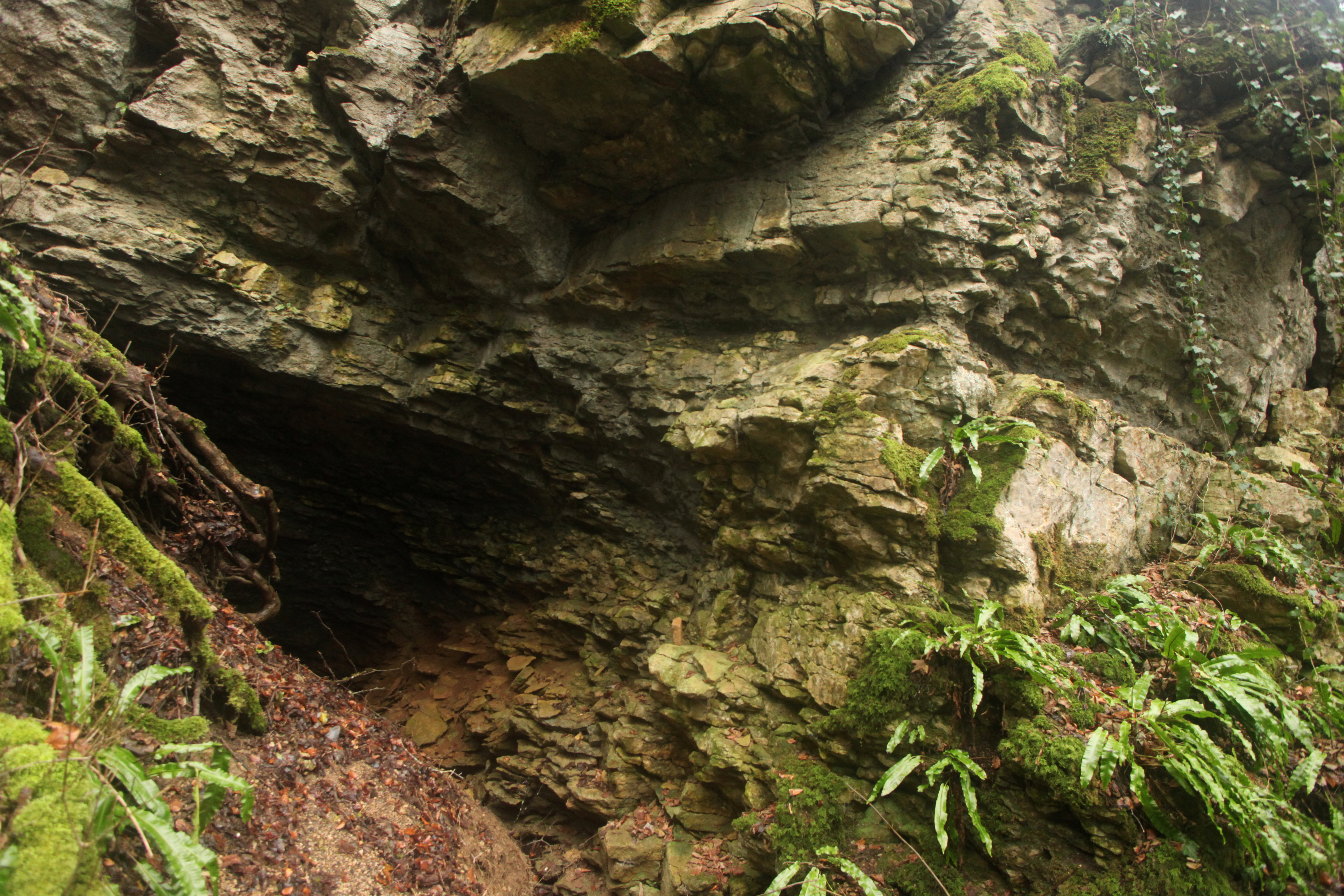 Le trou du Seris dans la RNR des grottes du cirque.